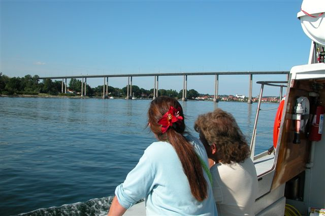 Svendborgsundbroen